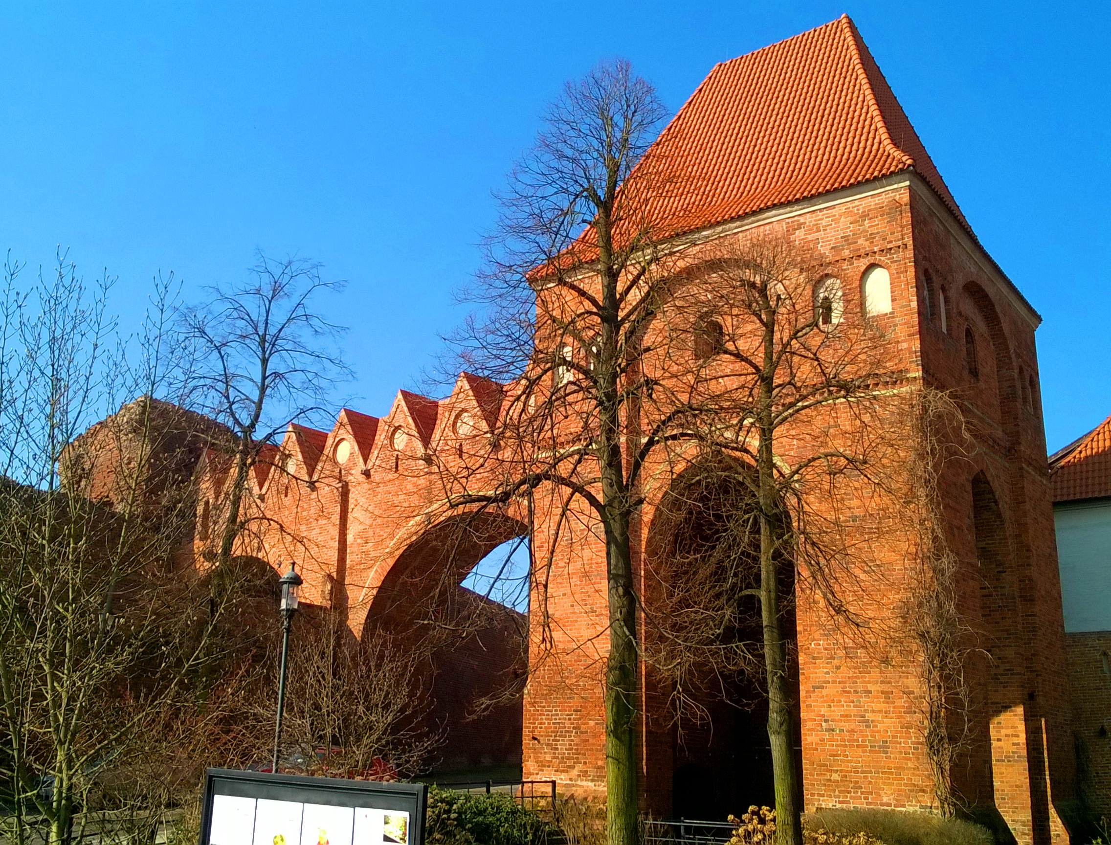 Gdanisko w Toruniu